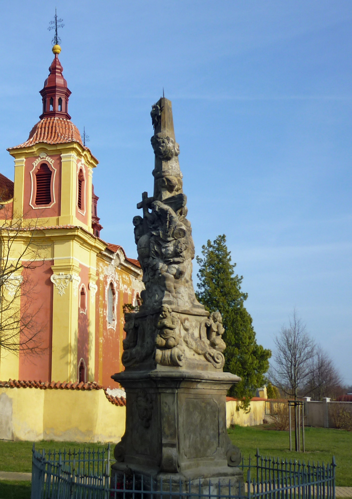 Dreifaltigkeitssäule in Neusattel (Nové Sedlo)